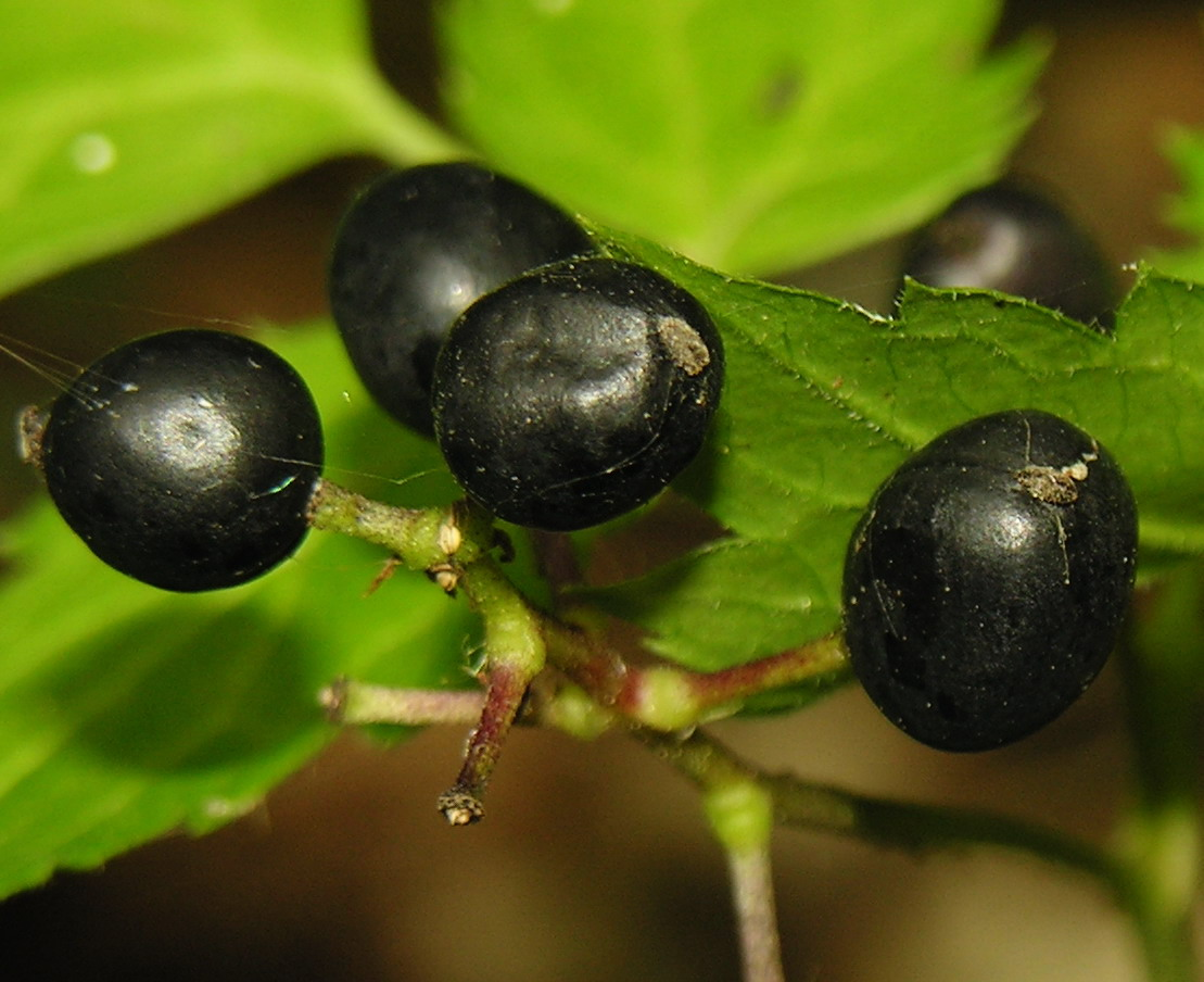 Varpotoji juodžolė (Actaea spicata), vaisiai Šeima. Vėdryniniai (Ranunculaceae) Foto: Algirdas, 2006 m. liepos 29 d., Lietuva